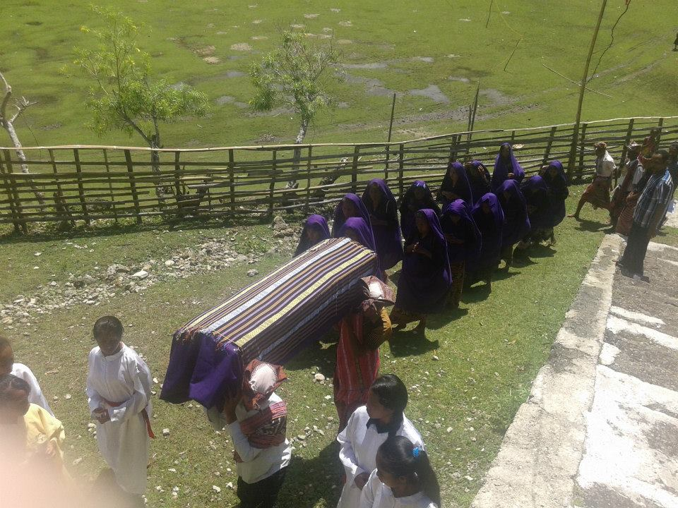 Leohito